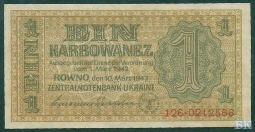 1 карбованец Рейхскомиссариата Украина, Ровно, март 1942. Аверс.